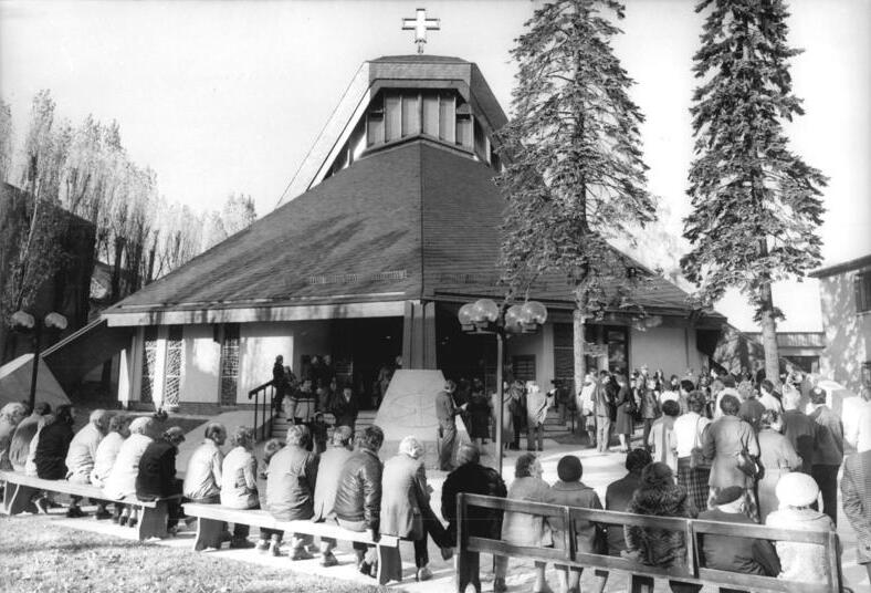 Ilmenau, Katholische Kirche ADN-ZB Deutsche Demokratische Republik 24.11.83 me. Neue katholische Kirche in Ilmenau Die katholische Gemeinde in Ilmenau (DDR Bezirk Suhl) erhielt Anfang November 1983 eine neue Kirche und die Hochschulstadt ein aus bodenständigen Material entstandenes Neues Wahrzeichen. Nach zweieinhalbjährlicher Bauzeit wurde die neue St. Josefskirche feierlich konsekriert. Der Schieferbedeckte Bau aus Holz und Beton mit seiner modernen in der DDR bisher einmaligen Zeltdachkonstruktion paßt sich harmonisch der thüringischen Landschaft an. Die Predigt des Einweihungsgottesdienstes der neuen Kirche hielt Bischof Dr. Joachim Wanke vom bischöflichen Amt Erfurt-Meiningen. Vertreter der örtlichen staatlichen Organe wohnten den Feierlichkeiten bei. Reporter: Schaar Copyright. ADN-Zentralbild Berlin-DDR